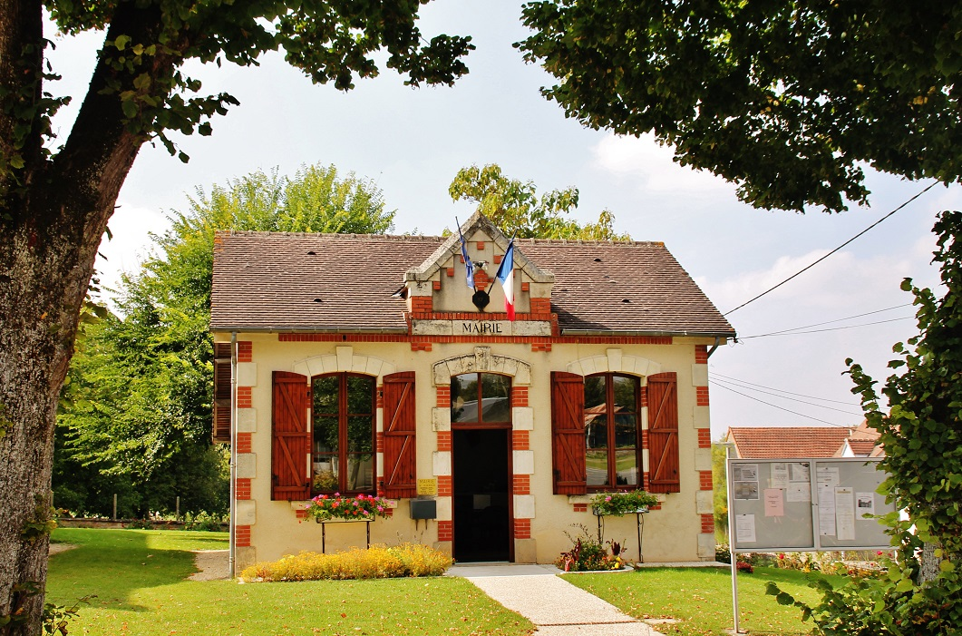 La Mairie